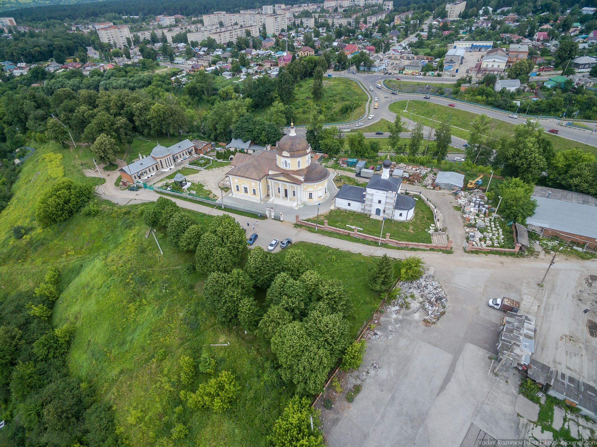 Ансамбль Успенского собора: площадь Базарная, Алексин, Алексинский район, Тульская область